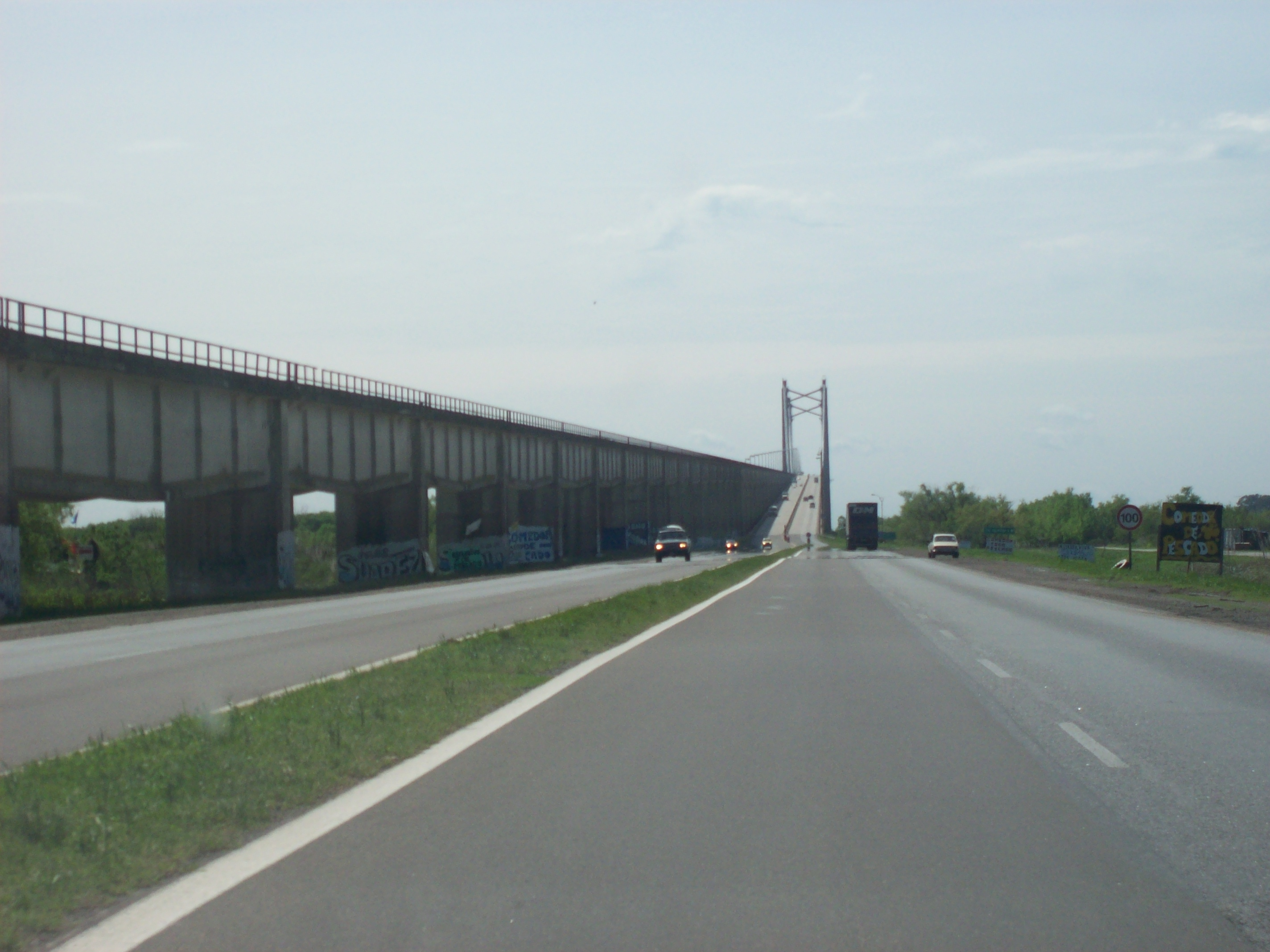 Urquiza Bridge over Paraná Guazú river, in Buenos Aires - Entre Ríos border, Argentina